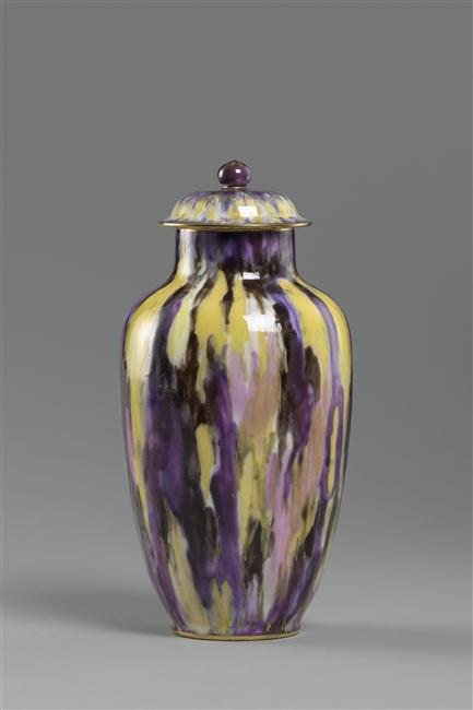 Vase Saïgon